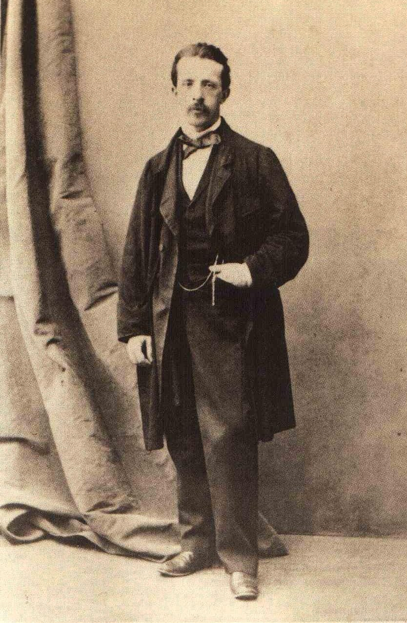 Guido Calvi (1827-1906), fotografo parmigiano.